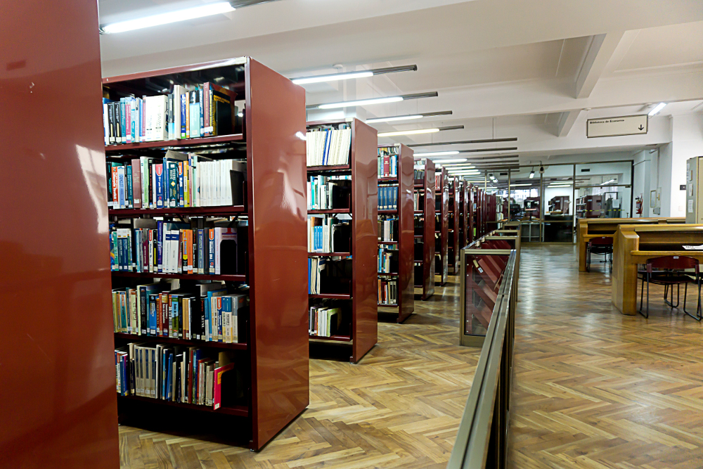 Estanterías y Sala de Lectura del Centro de Documentación e Información, del Ministerio de Hacienda Argentina